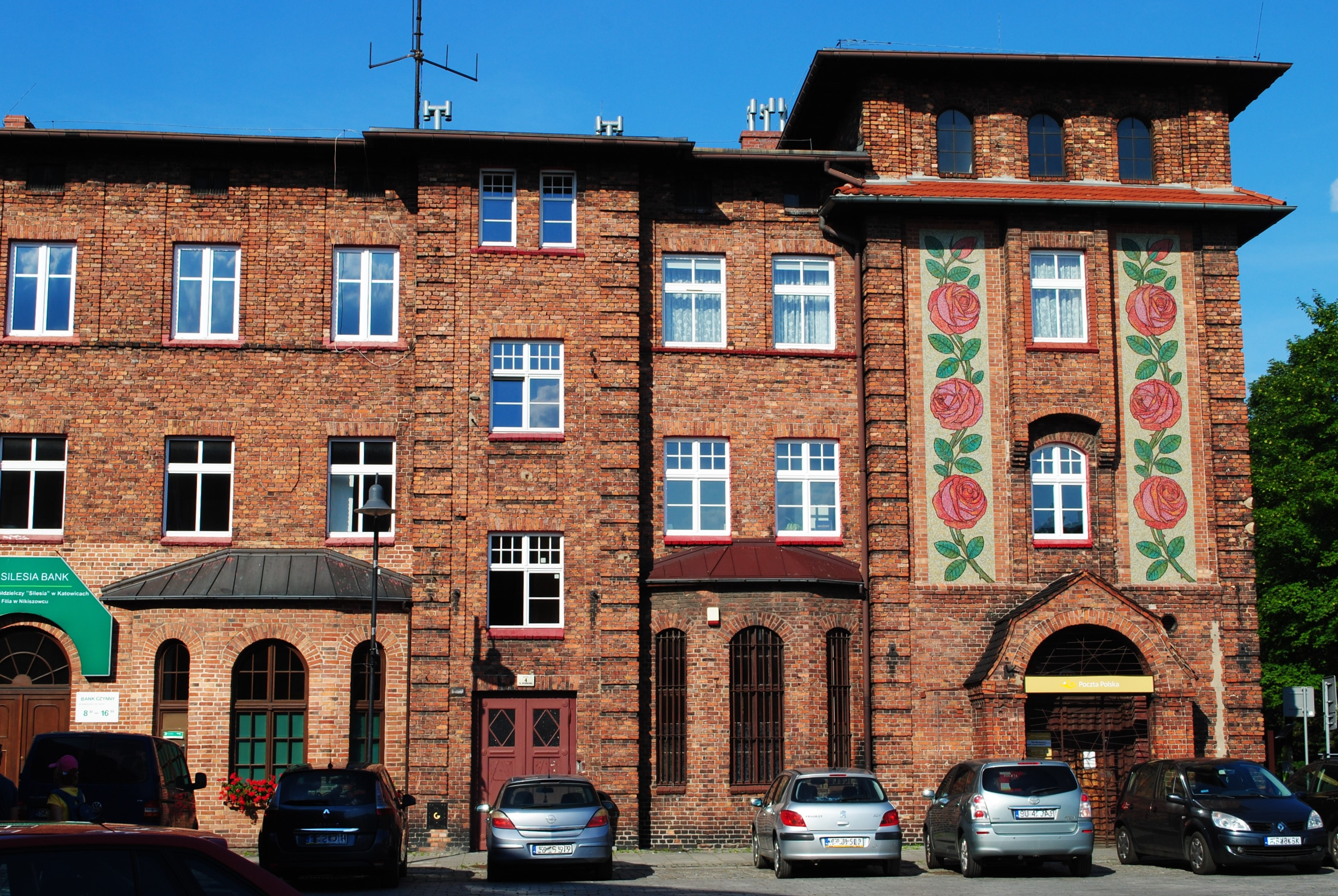 Katowice - Janów-Nikiszowiec. Plac Wyzwolenia